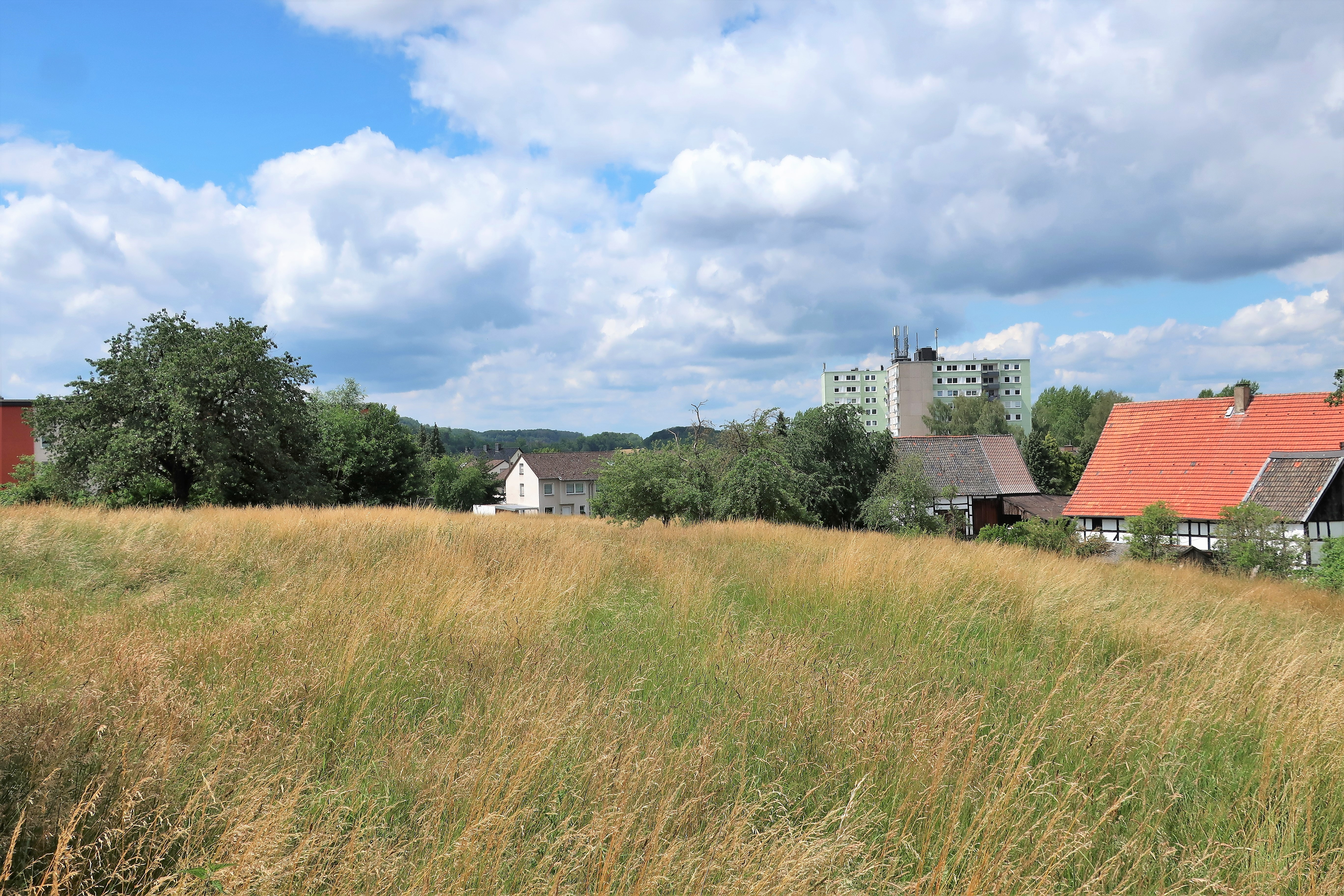 Geschützter Landschaftsbestandteil 1.4.2.41 „Tümpel Kronocken“ in Hagen-Hohenlimburg, Alte Heerstraße 5 (Bauernhof). Es handelt sich um einen Tümpel mit Kopfweiden in einer Obstwiese (Fotomitte von links bis zum Bauernhof) südöstlich von Henkhausen, östlich der Alten Heerstraße.